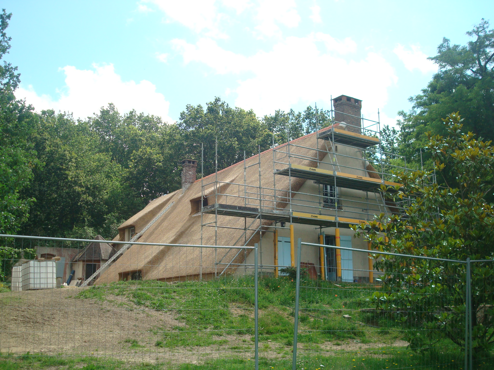 JeanMonnet-house.JPG: Будинок Жана Моне на реконструкції, 2012 рік